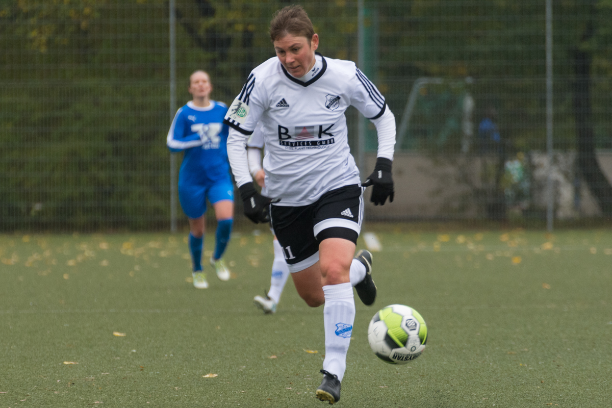 Angela Migliazza vs FFC Wacker München